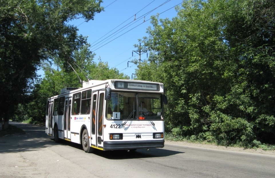 Первый АКСМ 20101 барнаульской сборки на проспекте Космонавтов